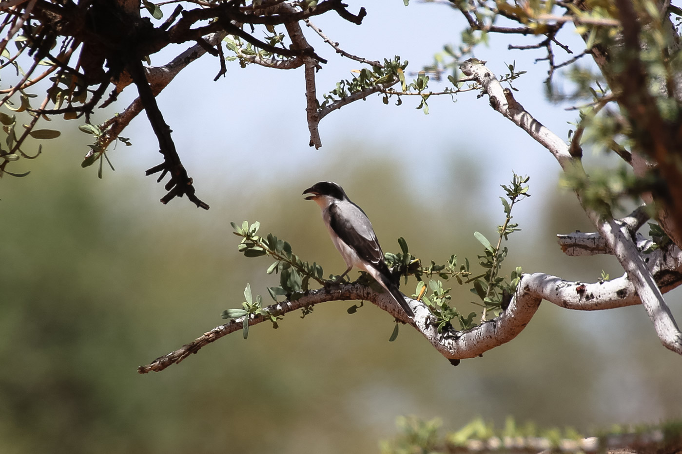 Lesser grey shrike-0747